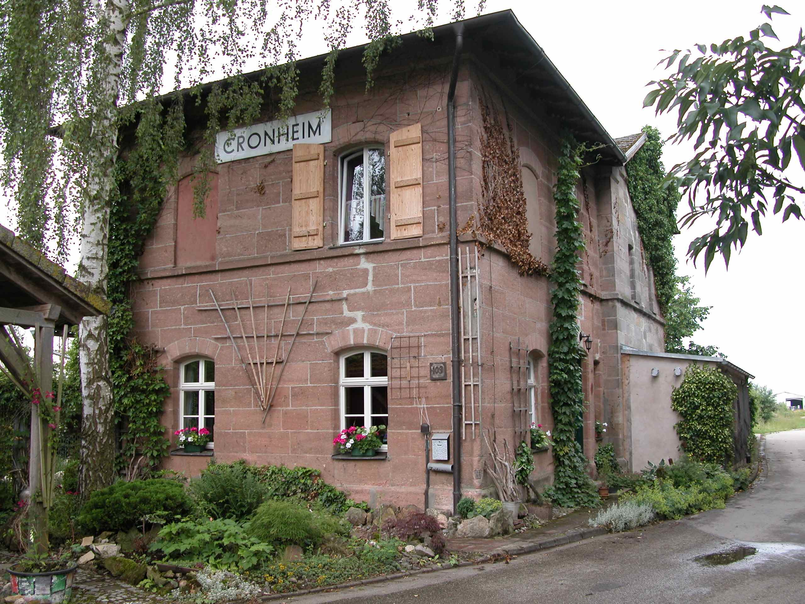 Cronheim 109 Bahnhof